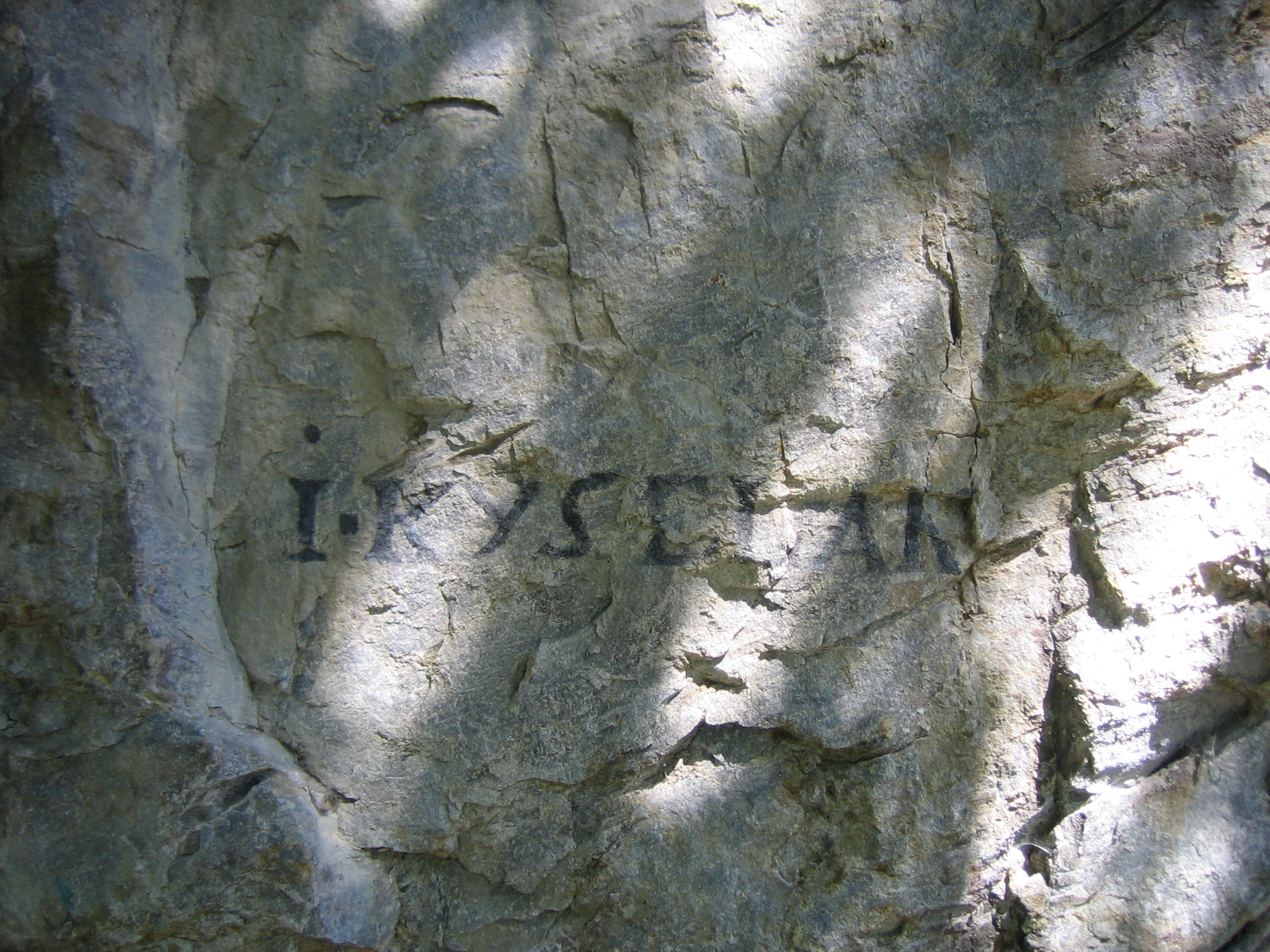 Kyselak-Painting at Wachau, Austria